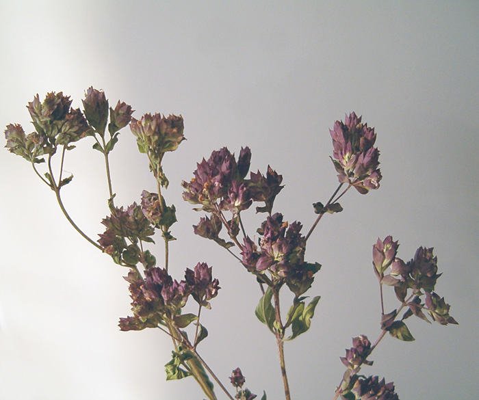 Стрък изсушен риган